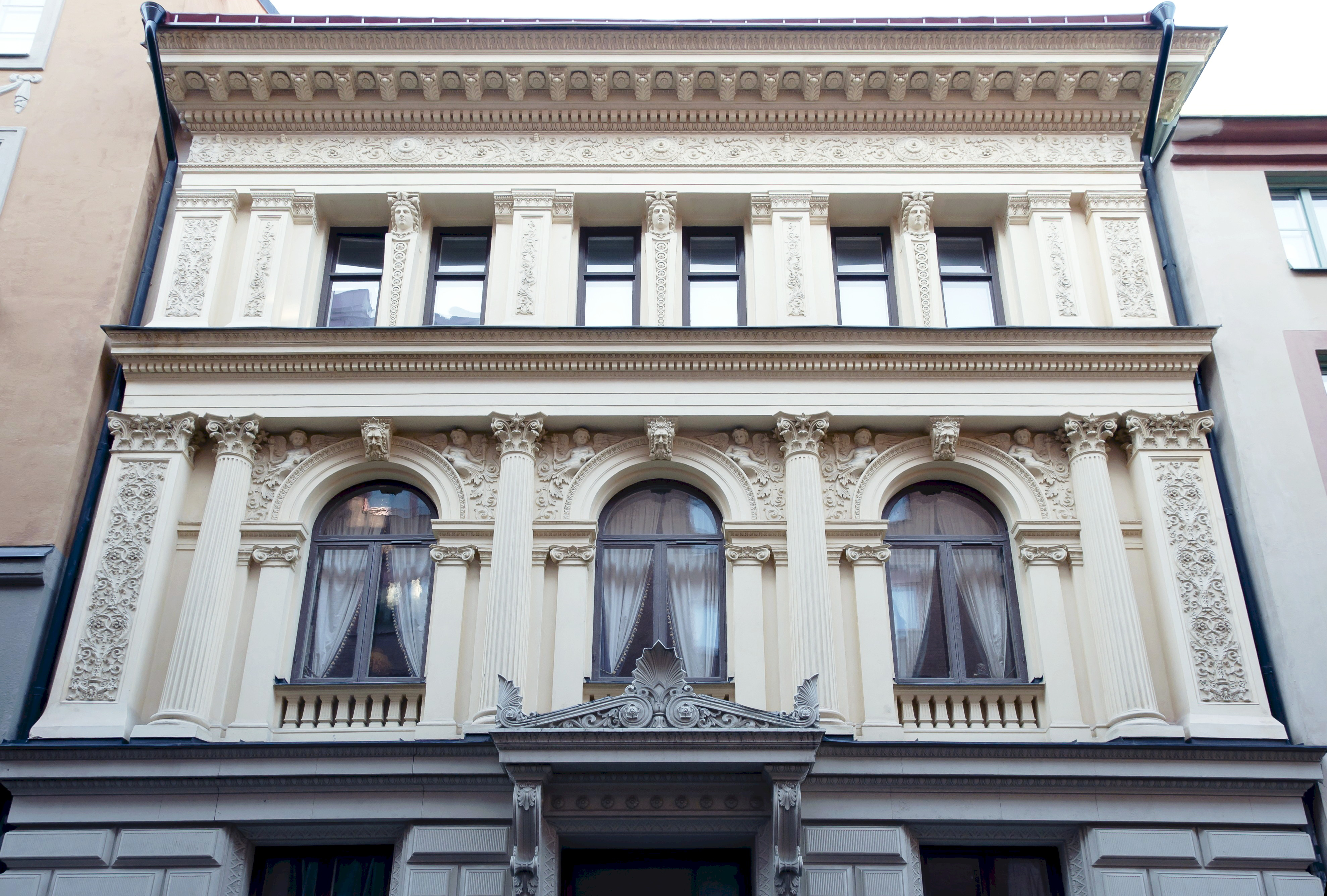 Stuckatörens hus, kv. Vätan 18, David Bagares gata 10. Byggnadsår 1882--83, arkitekt Valfrid Karlsson, byggherre och byggmästare Axel Notini.